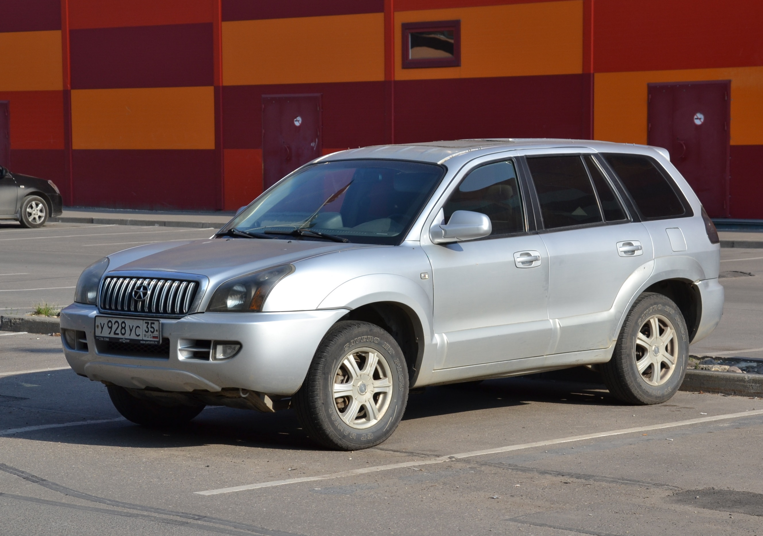 Кроссовер JAC Rein